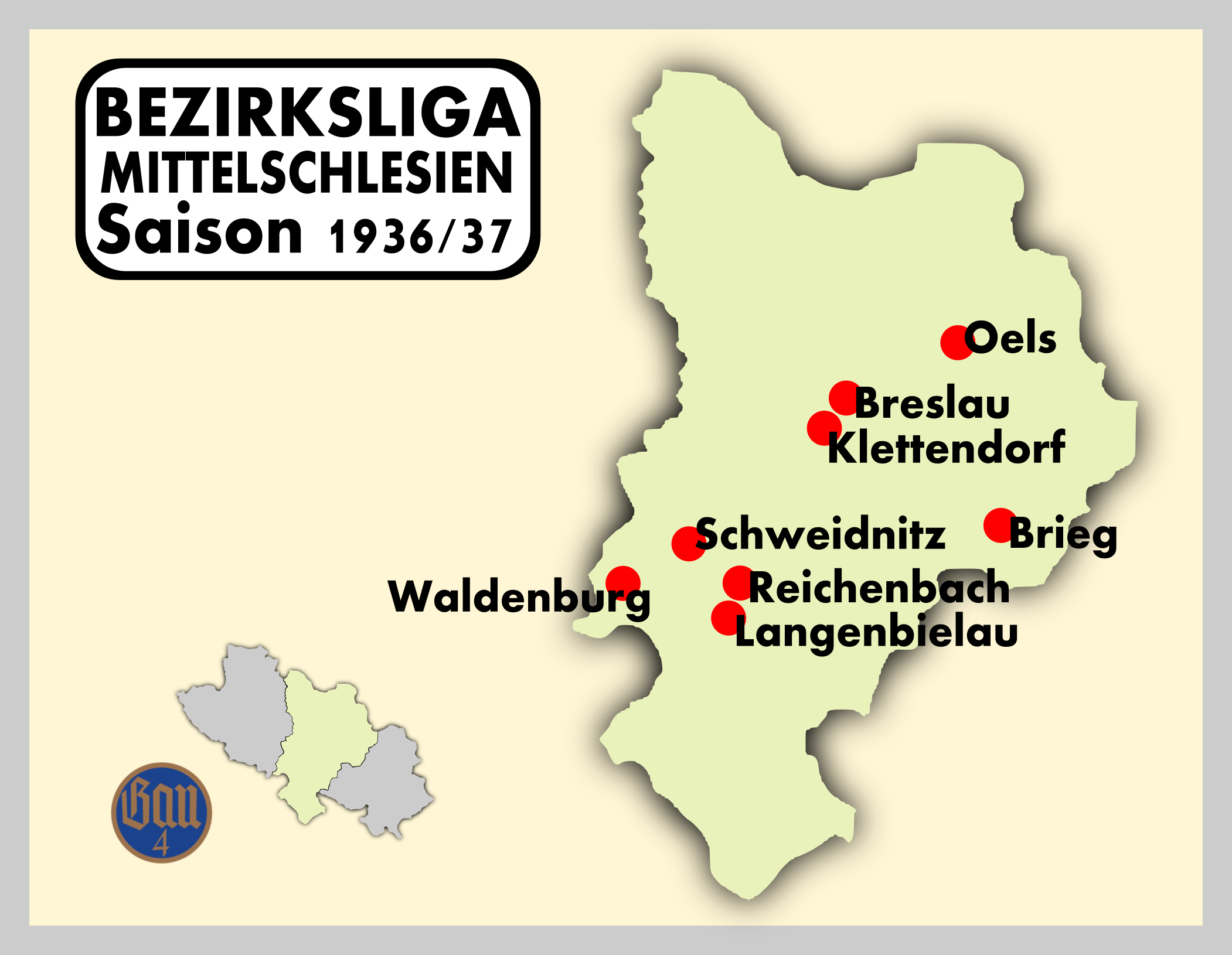 Spielorte der Bezirksliga Mittelschlesien 1936/37.